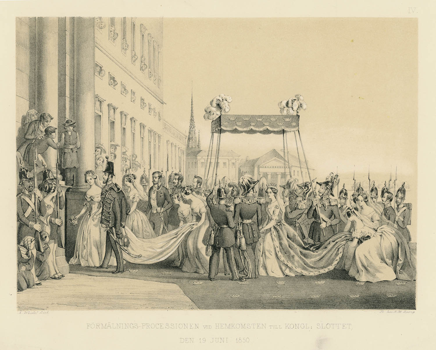 Depicted person: Karl XV, Kung av Sverige och Norge 1859-1872, Sverige (1826-05-03-1872-09-18); Karl IV (namn som kung av Norge); Carl IV (alternativ stavning); Carl XV (alternativ stavning); Lovisa, Drottning av Sverige och Norge 1859-1871 (1828-08-05-1871-03-30); Lovisa av Nederländerna